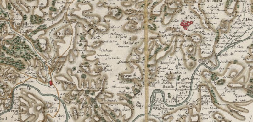 Carte générale de la France. 035, [Sarlat-la-Canéda]. N°35. Flle 155 / [établie sous la direction de César-François Cassini de Thury]